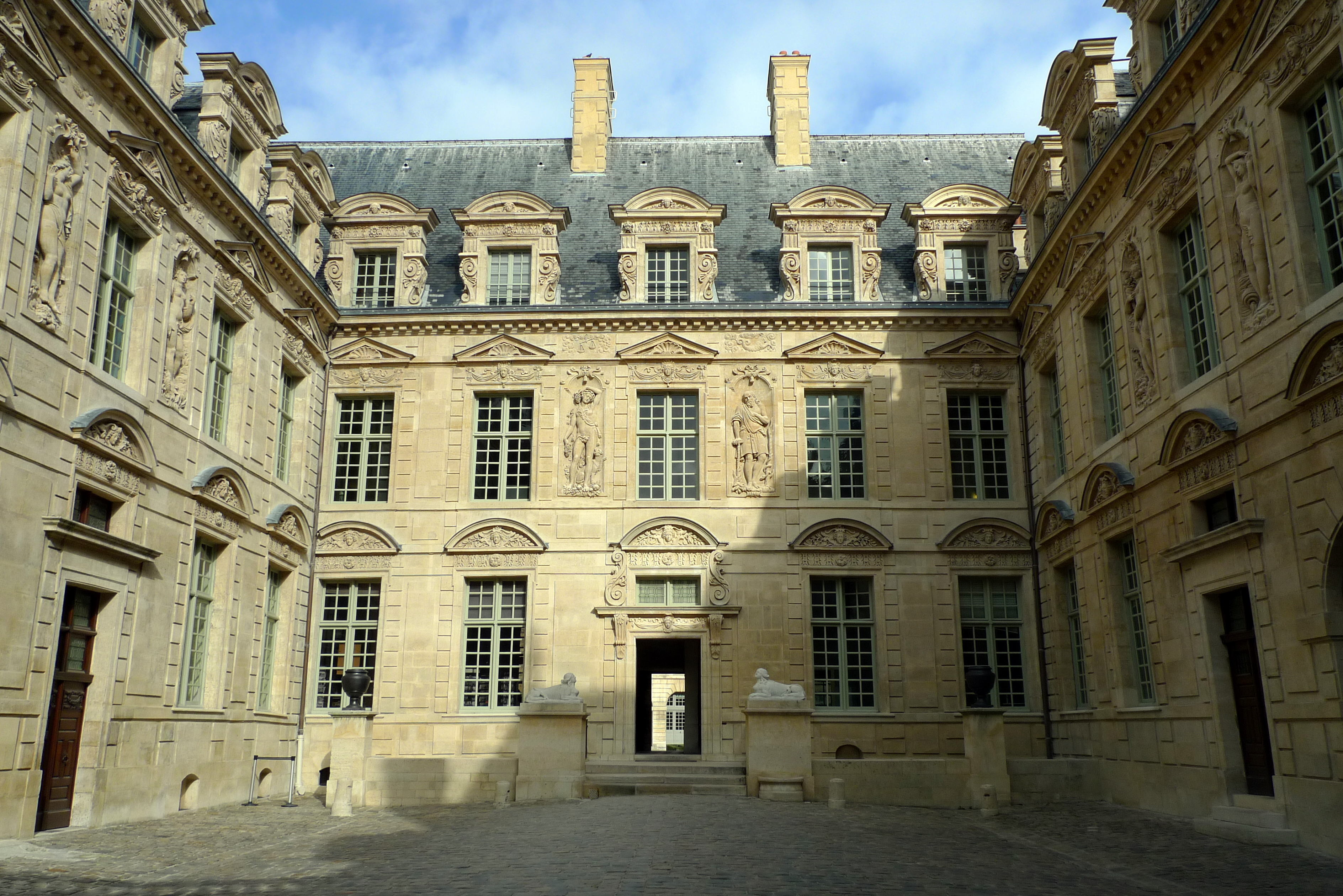 L'hôtel de Sully à Paris